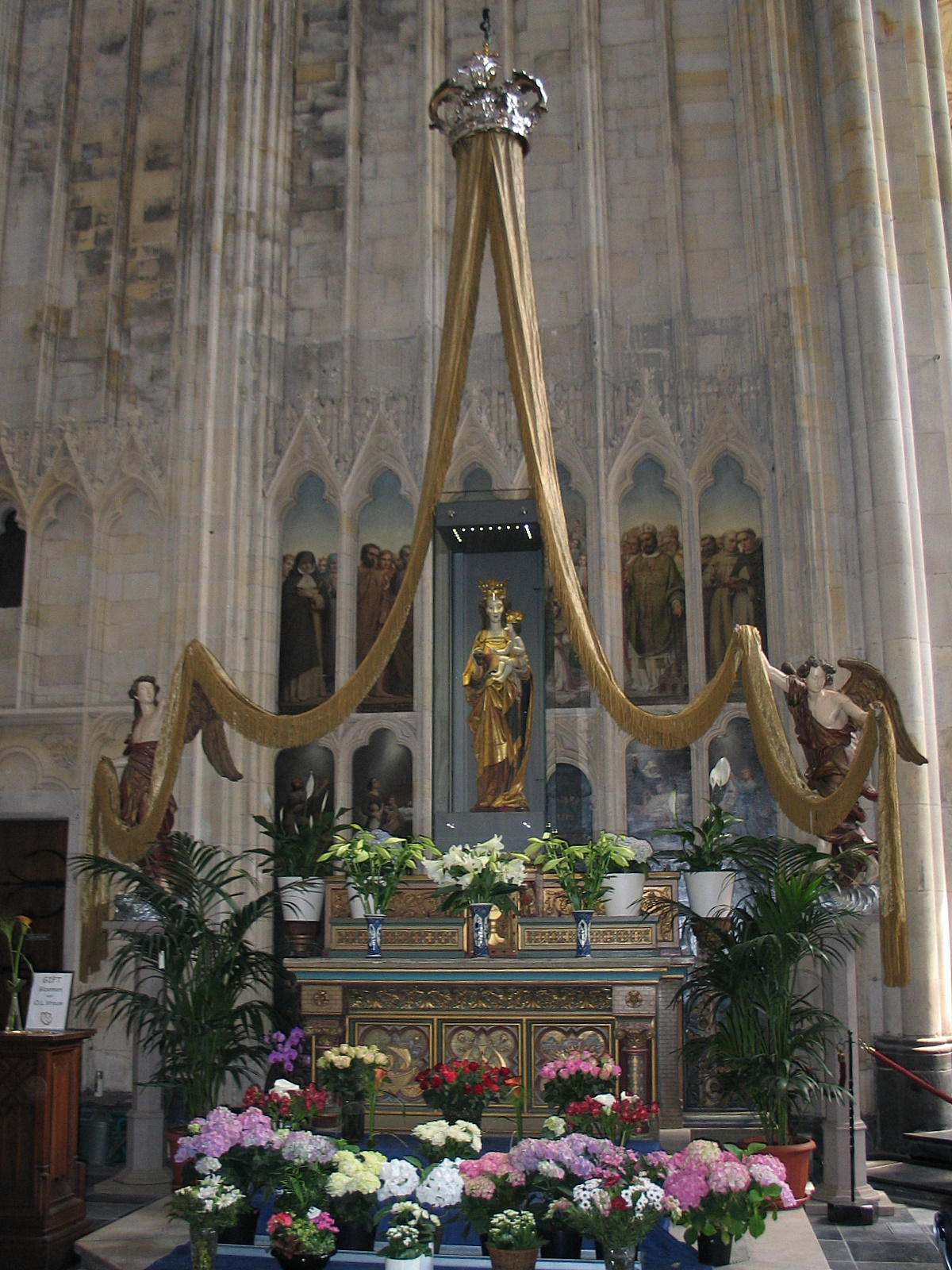 Onze-Lieve-Vrouw Oorzaak onzer blijdschap in de Onze-Lieve-Vrouwebasiliek van Tongeren